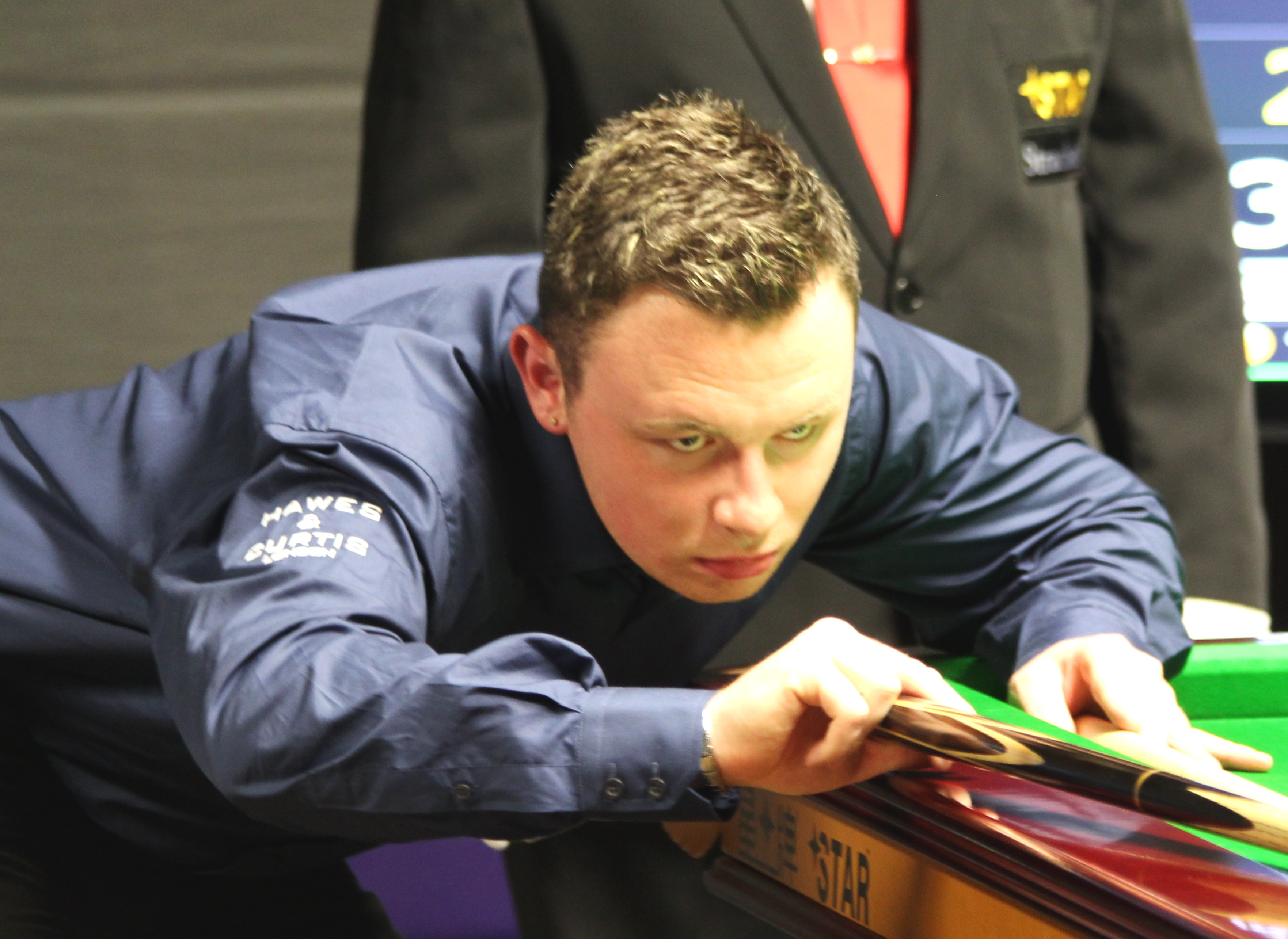 Duane Jones beim Paul Hunter Classic 2015